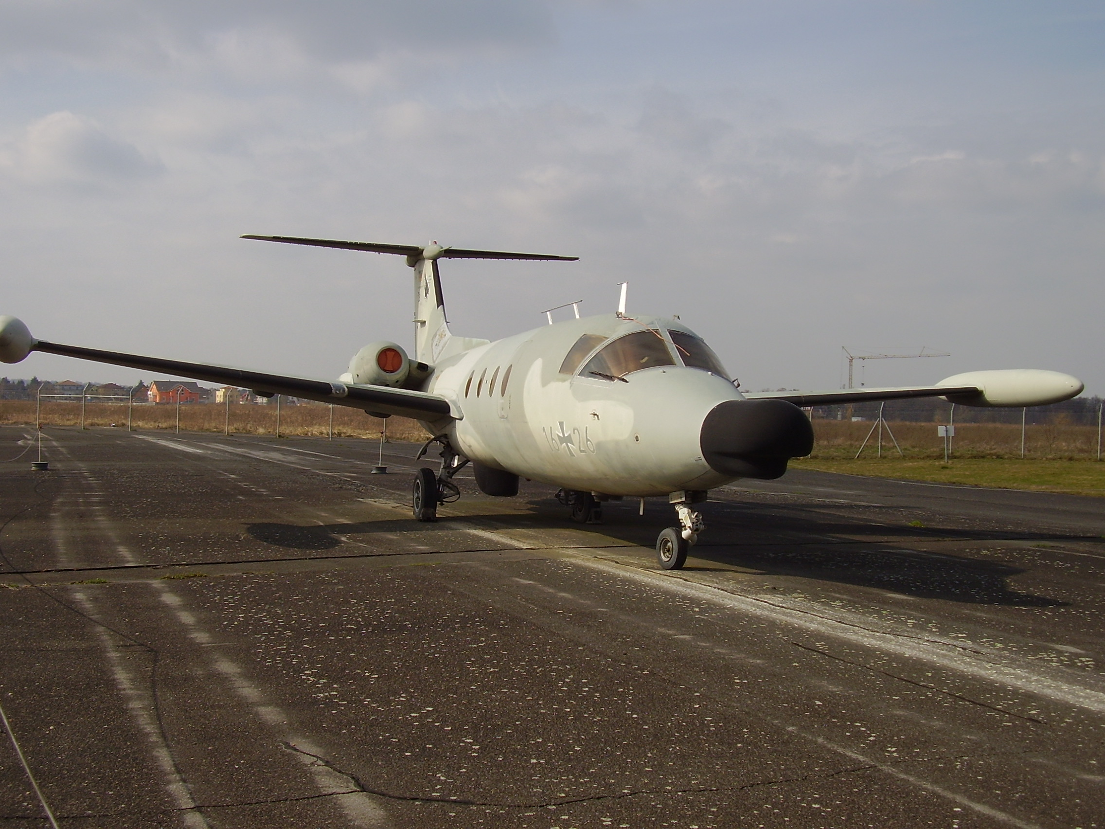 Luftwaffenmuseum der Bundeswehr; Airforce Museum of the Bundeswehr; Berlin-Gatow